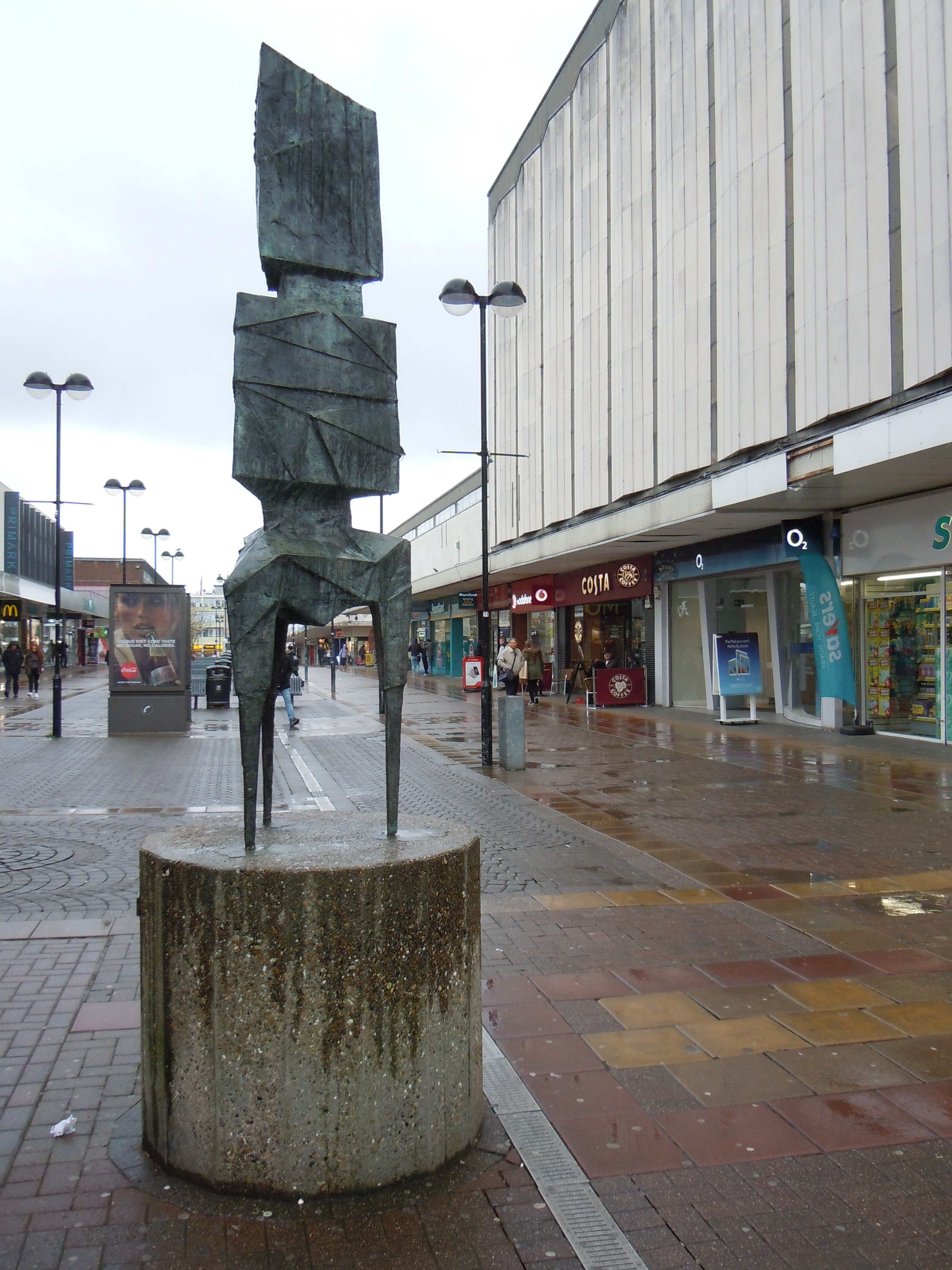 Trigon